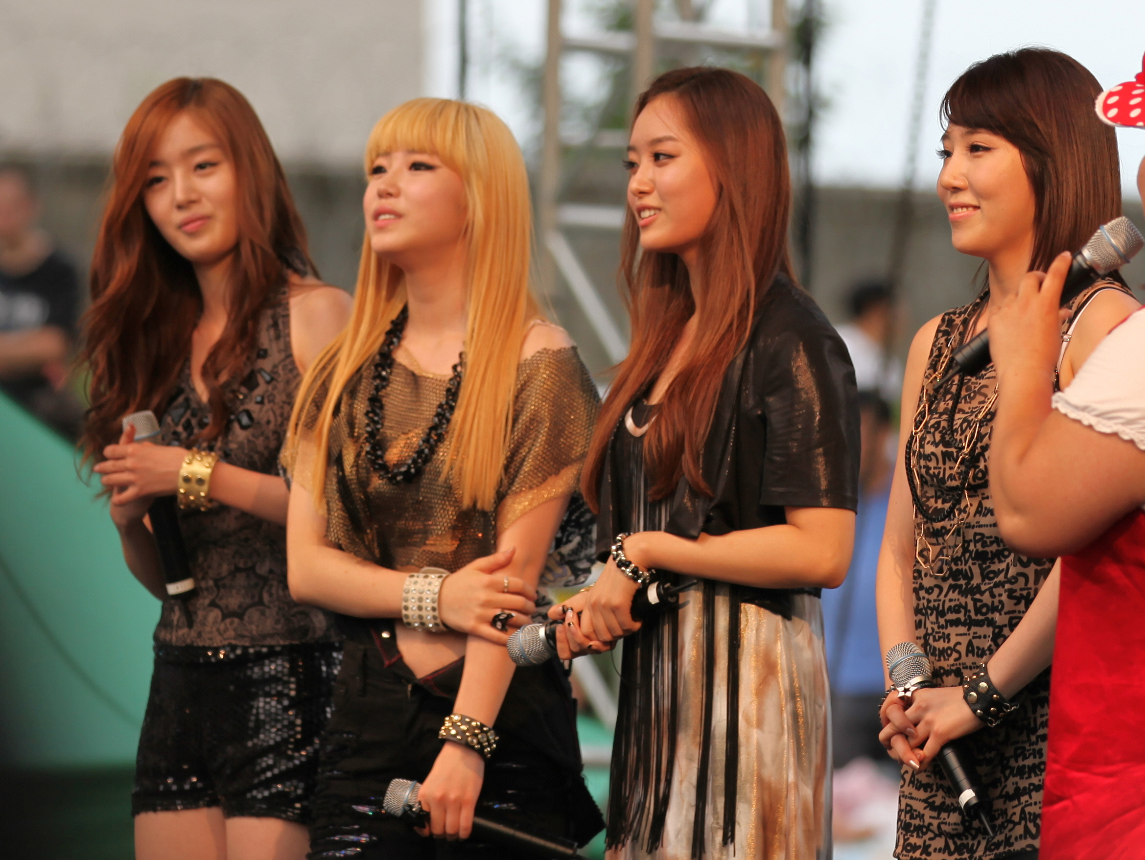 주한미군 독립기념일 축제 무대에 선 시크릿